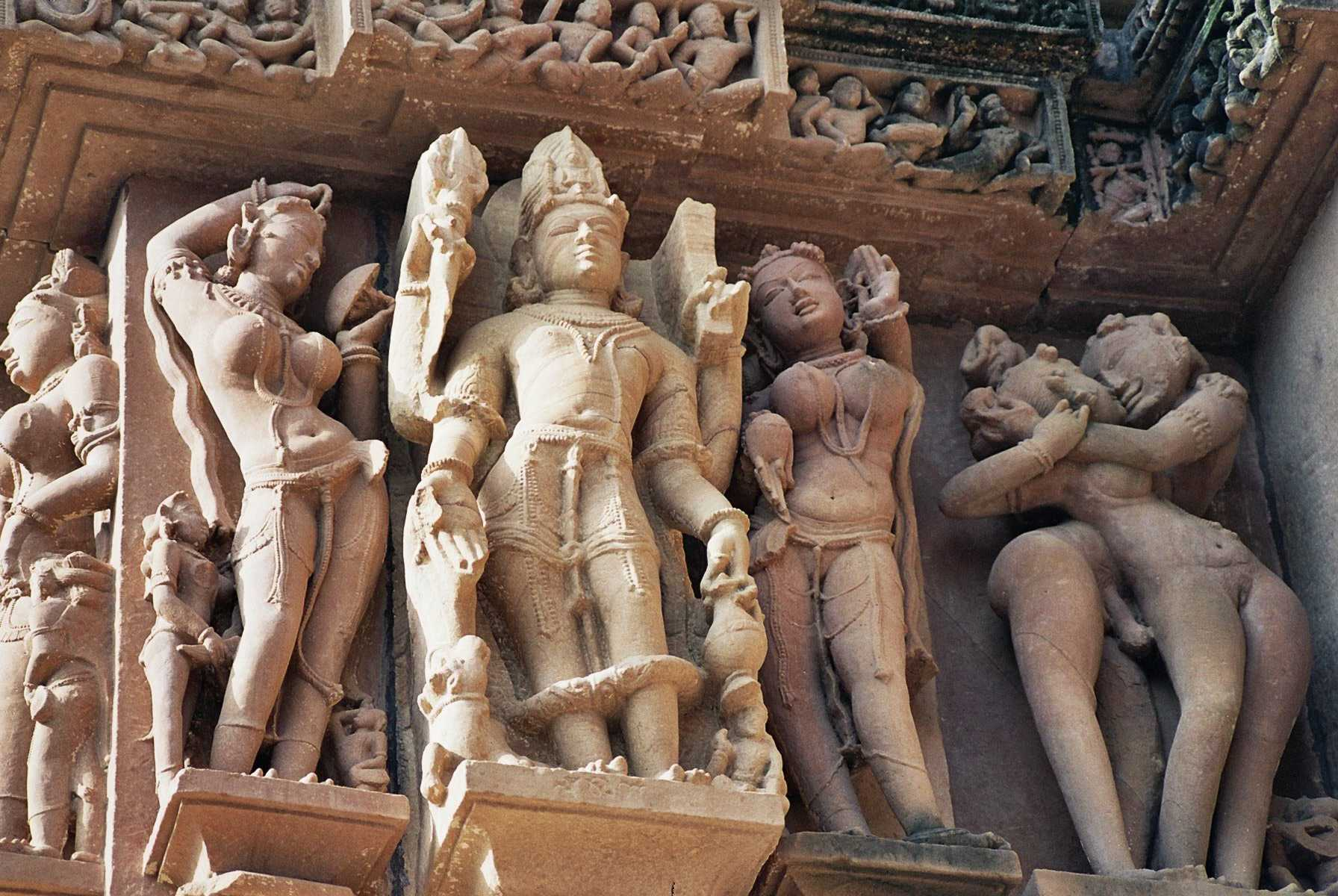 Khajuraho Temple, India Templo de Khajuraho, India. Picture take by User:Airunp